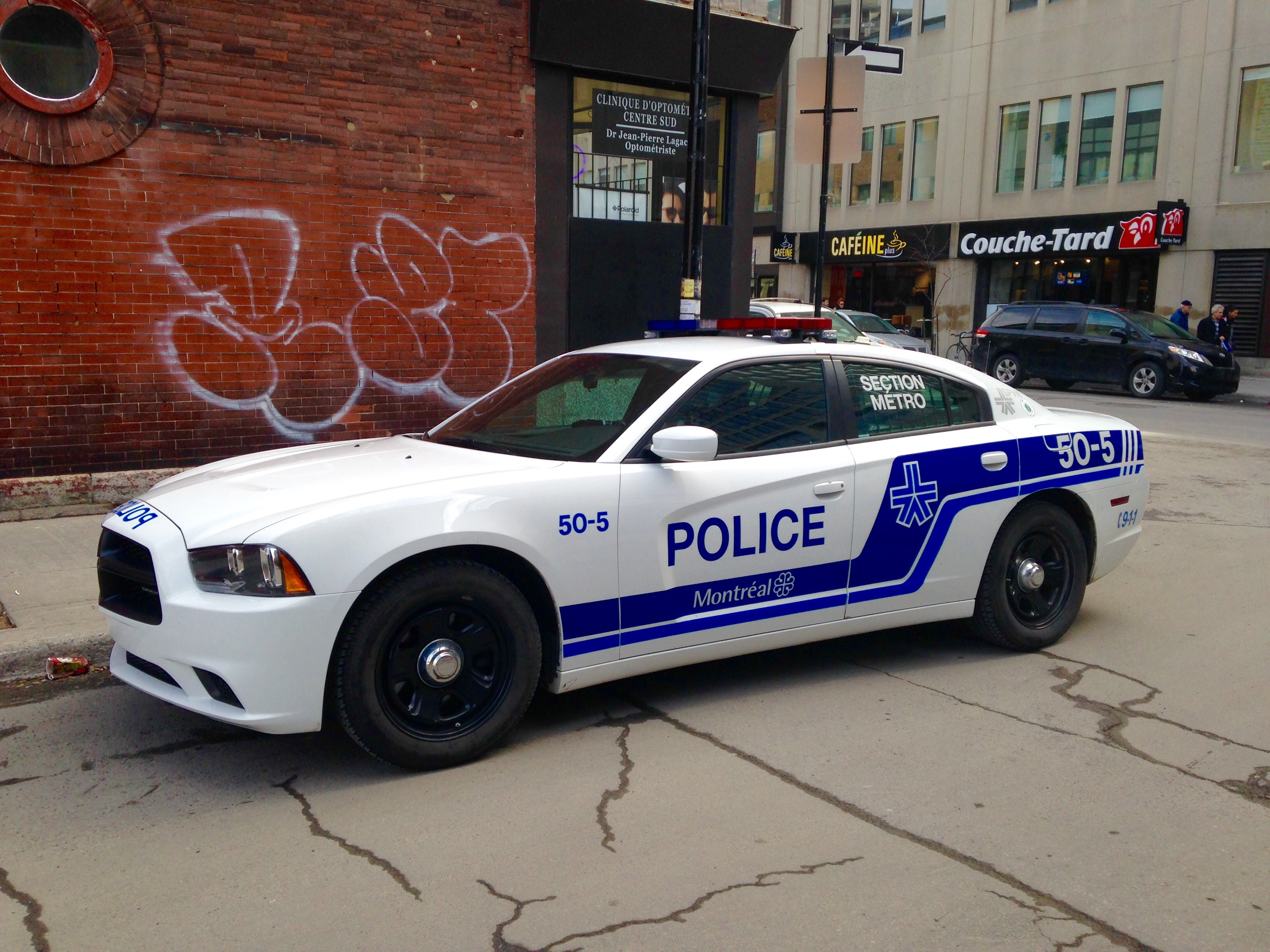 SPVM